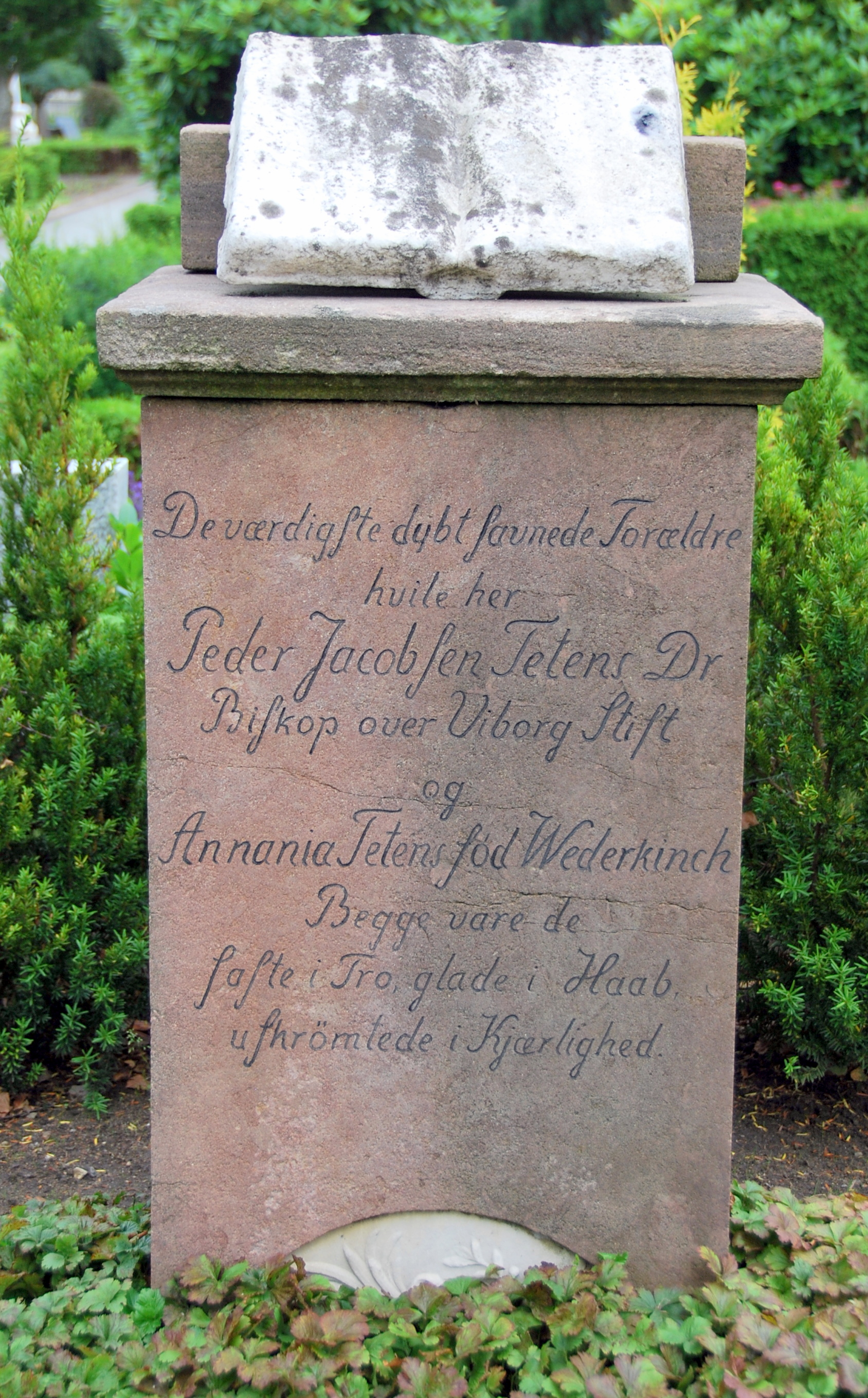 Gravsten for biskop Peder Jacobsen Tetens og hustru Annania. Placeret på Viborg Kirkegård.